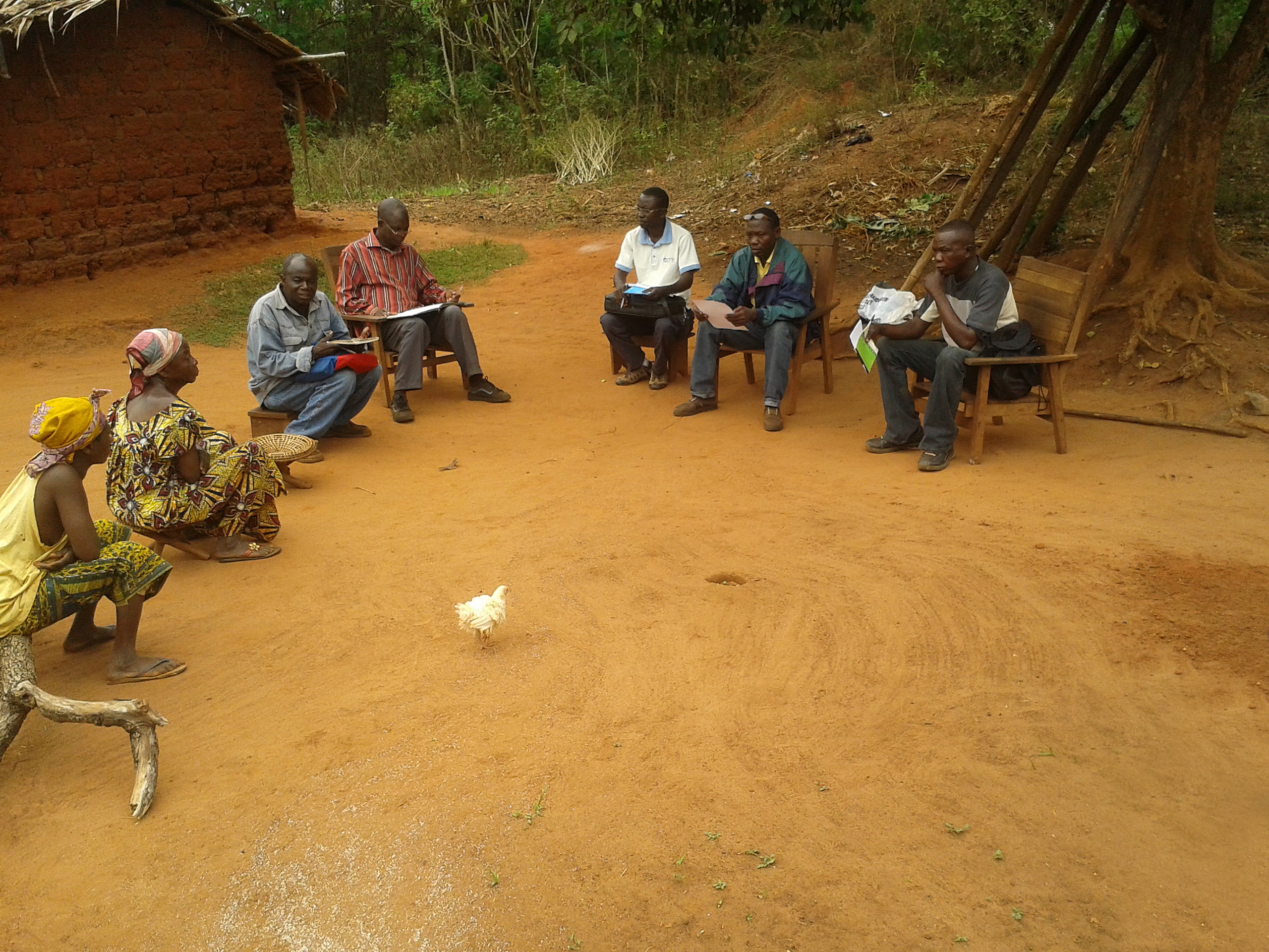 Réunion de concertation dans un village vers Berberati en RCA This is an image of Cultural Fashion or Adornment from Central African Republic